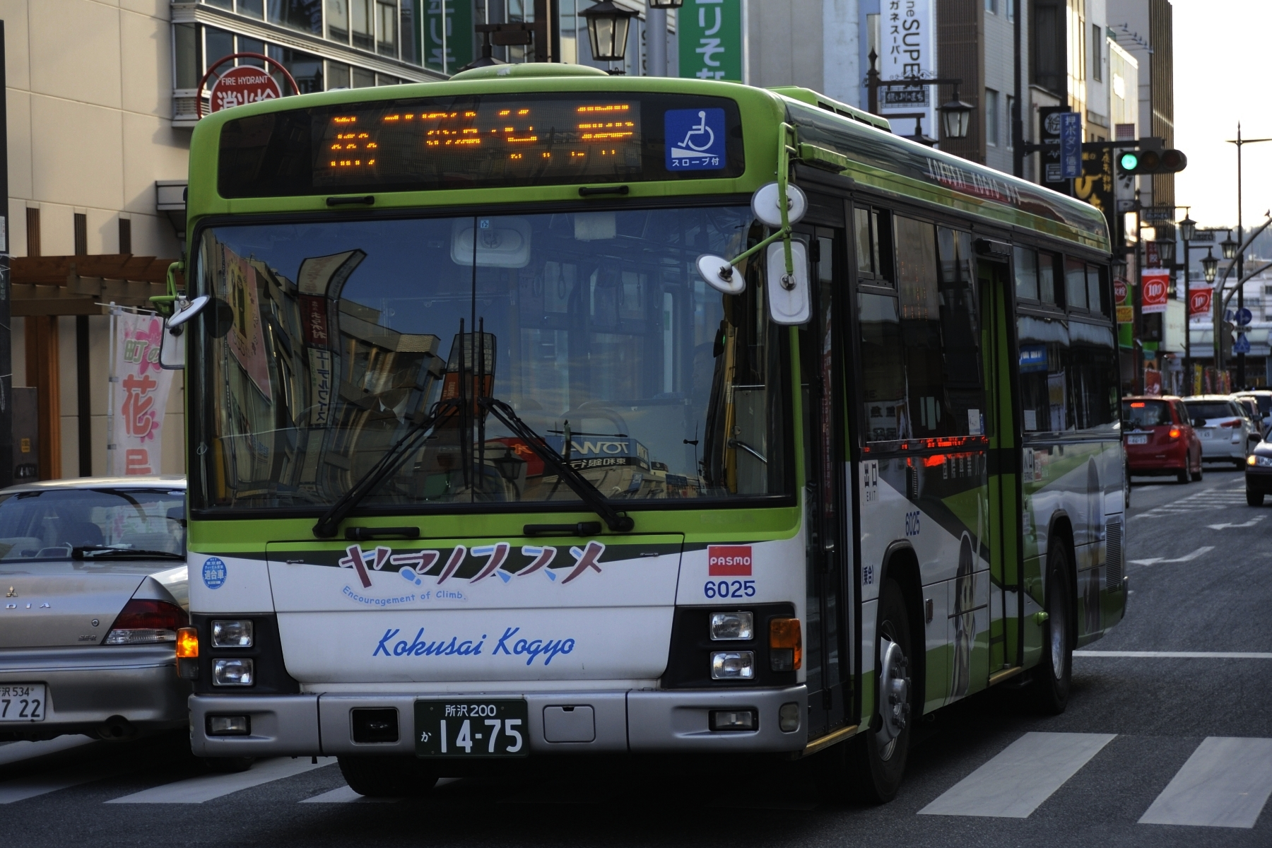 ヤマノススメ初代ラッピング車の6025